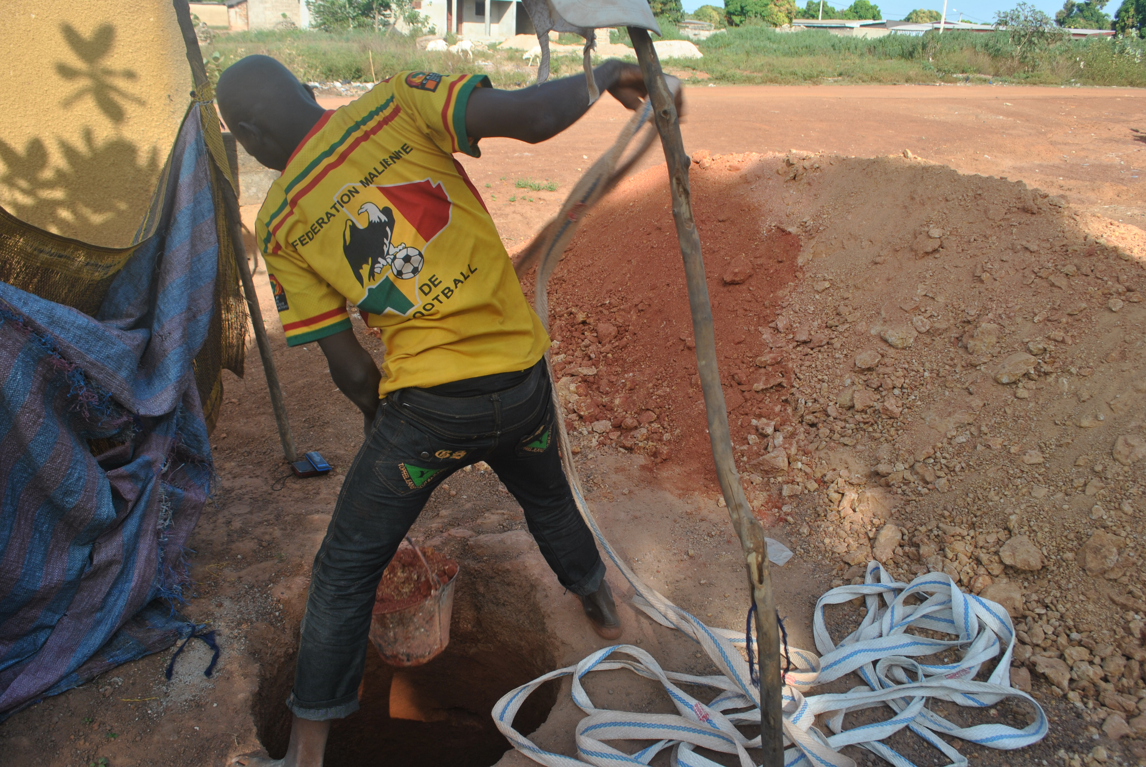 Un puisatier en pleine journée de travail à Ferké, une ville située au Nord de la Côte d'Ivoire. La ville est à environ 600 km d'Abidjan, la capitale économique ivoirienne. This is an image of "African people at work" from Ivory Coast